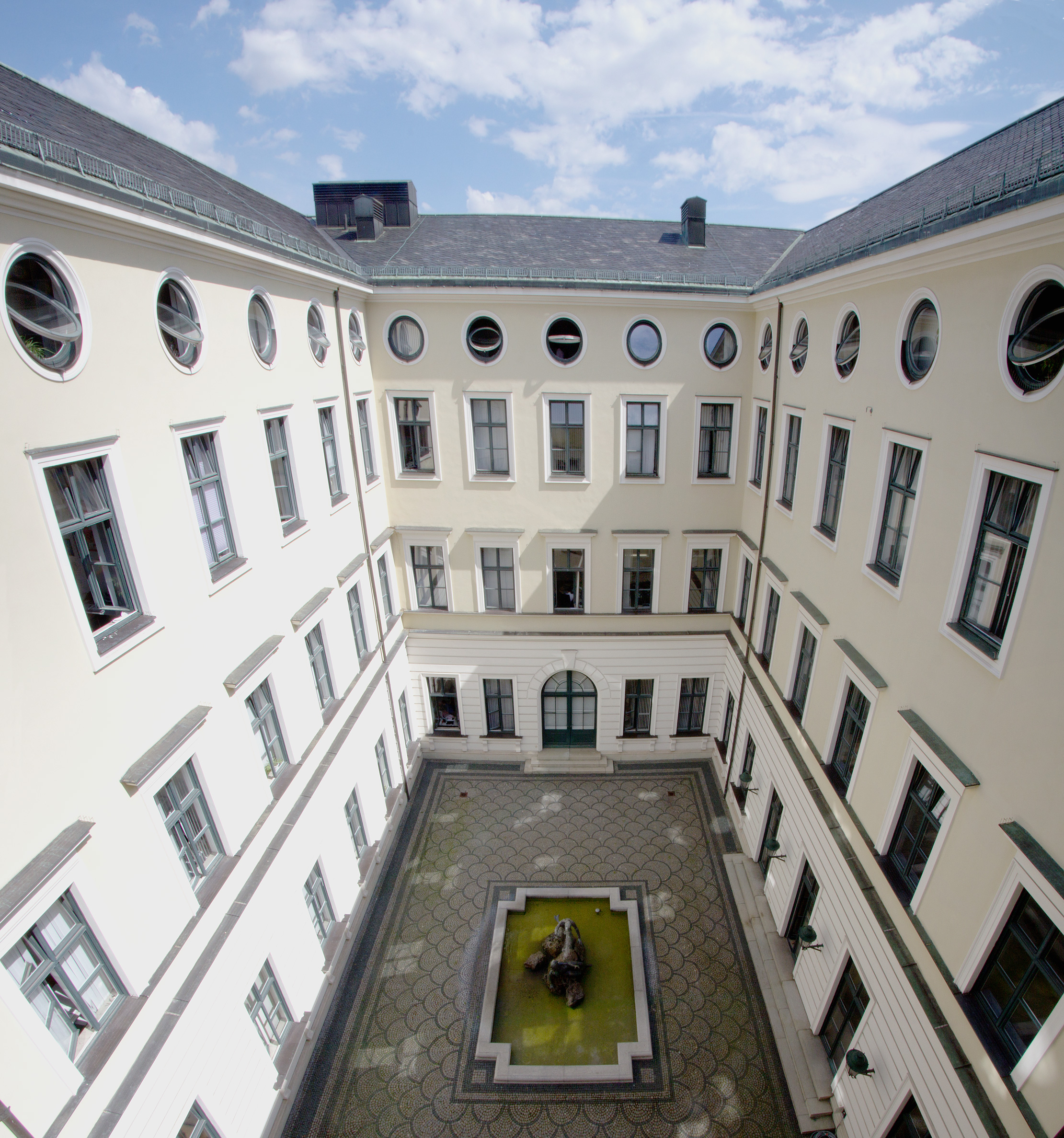 Wikipedia im Landtag – Bayern 17. bis 19. Juli 2012 in München Dieses Foto wurde im Rahmen des Projektes „Wikipedia im Landtag“ erstellt.